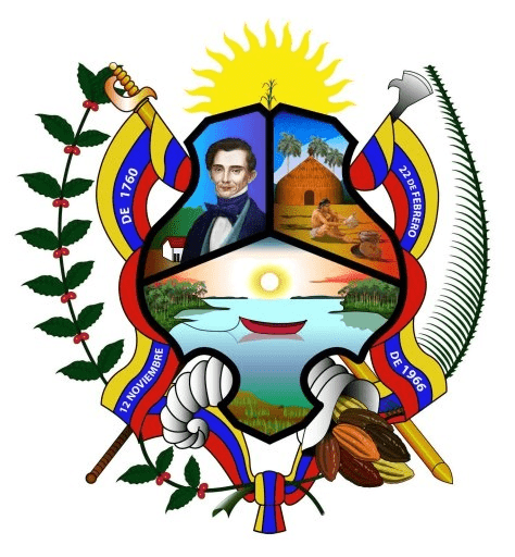 Escudo del municipio Cajigal, estado Sucre, Venezuela En la parte superior aparece el Sol y dentro de él una planta de caña de azúcar. El Sol simboliza el clima tropical que goza el municipio y la caña de azúcar representa la actividad agrícola. Debajo aparece una figura dividida en Tres partes, encontrándose en la parte superior izquierda la imagen del Dr. Juan Manuel Cajigal símbolo de las raíces que unen al municipio con la época de la independencia. En la parte superior derecha nos encontramos con un bohío y un indígena en homenaje a los primeros habitantes en la fundación de Yaguaraparo, los indios Guaraúnos. Y en la parte restante se observa una representación del Golfo, en recordación de la penetración europea y de la utilidad que brindó como vía de comunicación con las Islas del Caribe. Otros símbolos que también nos encontramos en el escudo son: Una espada: Conmemora la Batalla de Yaguaraparo, librada el 2 de septiembre de 1816. Una Desjarretadera: Herramienta cortante usada en las cosechas de cacao. Un Ramal de café: Significa la fertilidad del suelo. Un Ramal de Palmera: Alude al significado de la palabra que da nombre al pueblo. El Cuerno y El Cacao: Se refieren a la abundancia y la producción agrícola. El Tricolor Nacional: Son emblemas de la soberanía e independencia. 12 de Noviembre de 1760: Fecha de la Fundación 22 de Febrero de 1966: Creación Distrito Cajigal